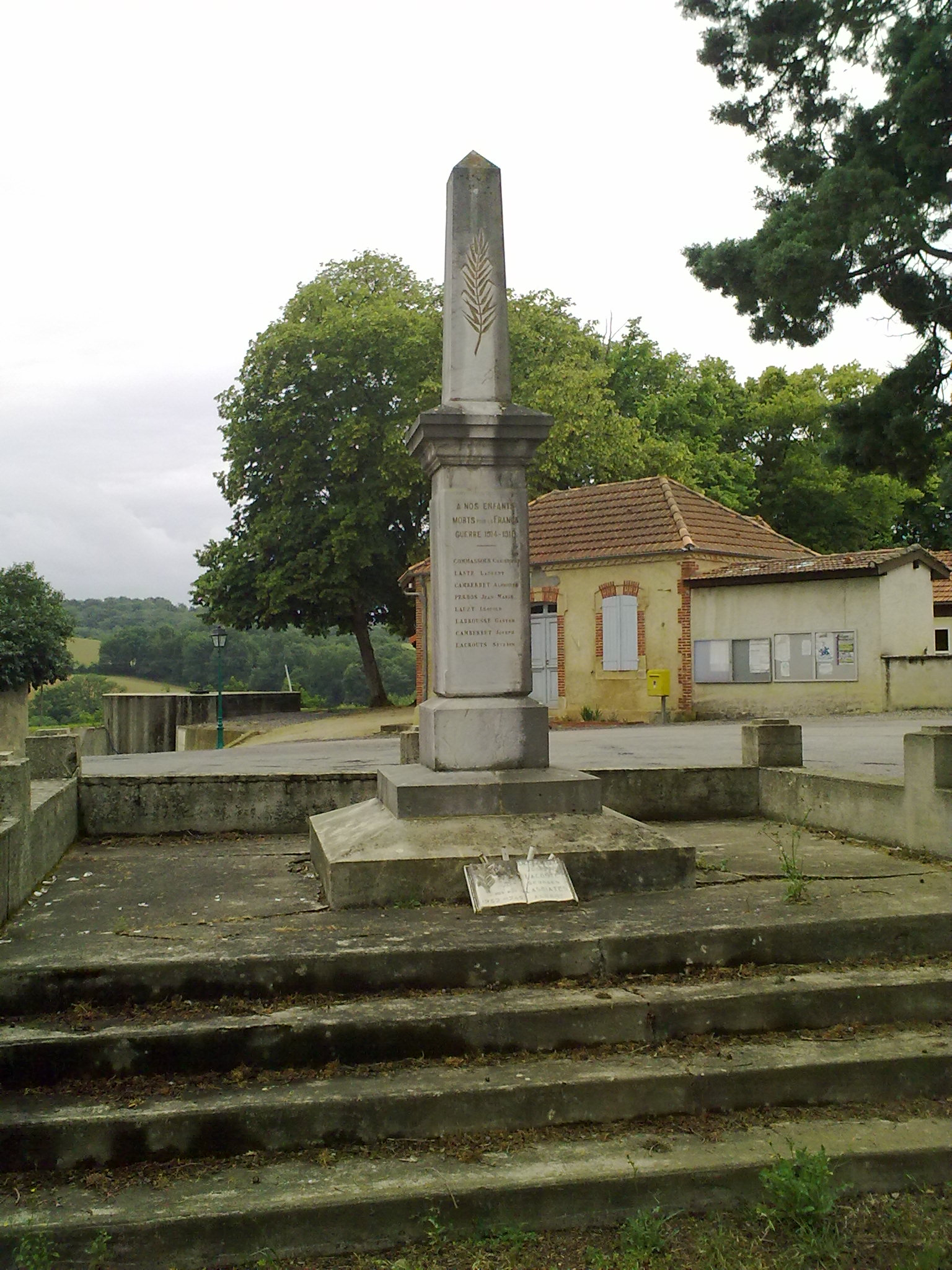 Aydie